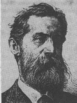 Ойген Дюкер, художник